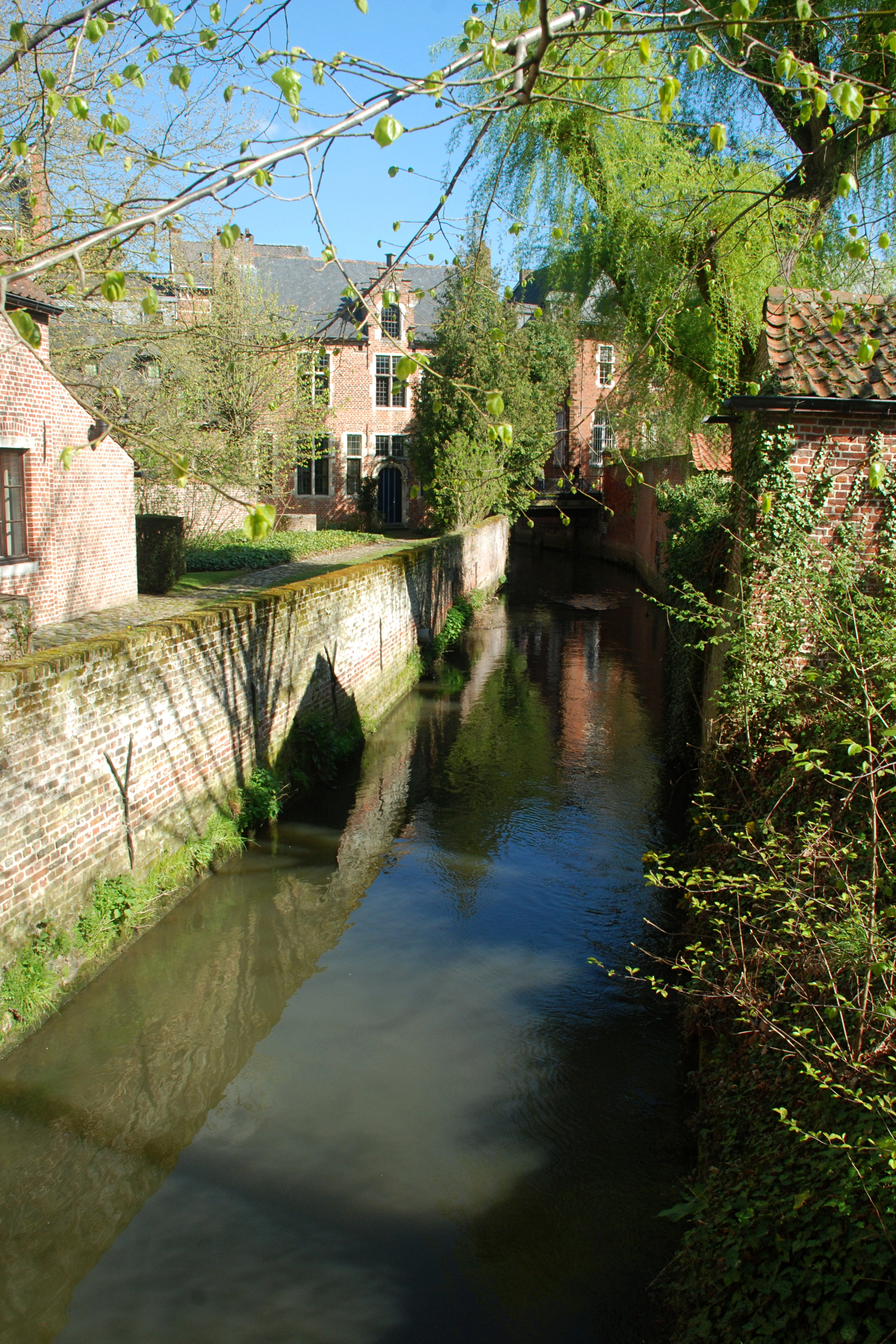 Belgium - Leuven - Groot Begijnhof - vue sur la Dyle jusqu'à la rue des Sœurs noires